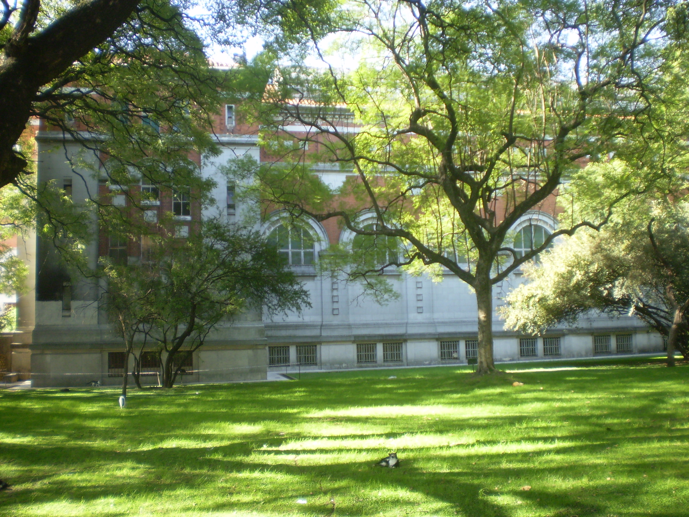 Museo Argentino de Ciencias Naturales "Bernardino Rivadavia"